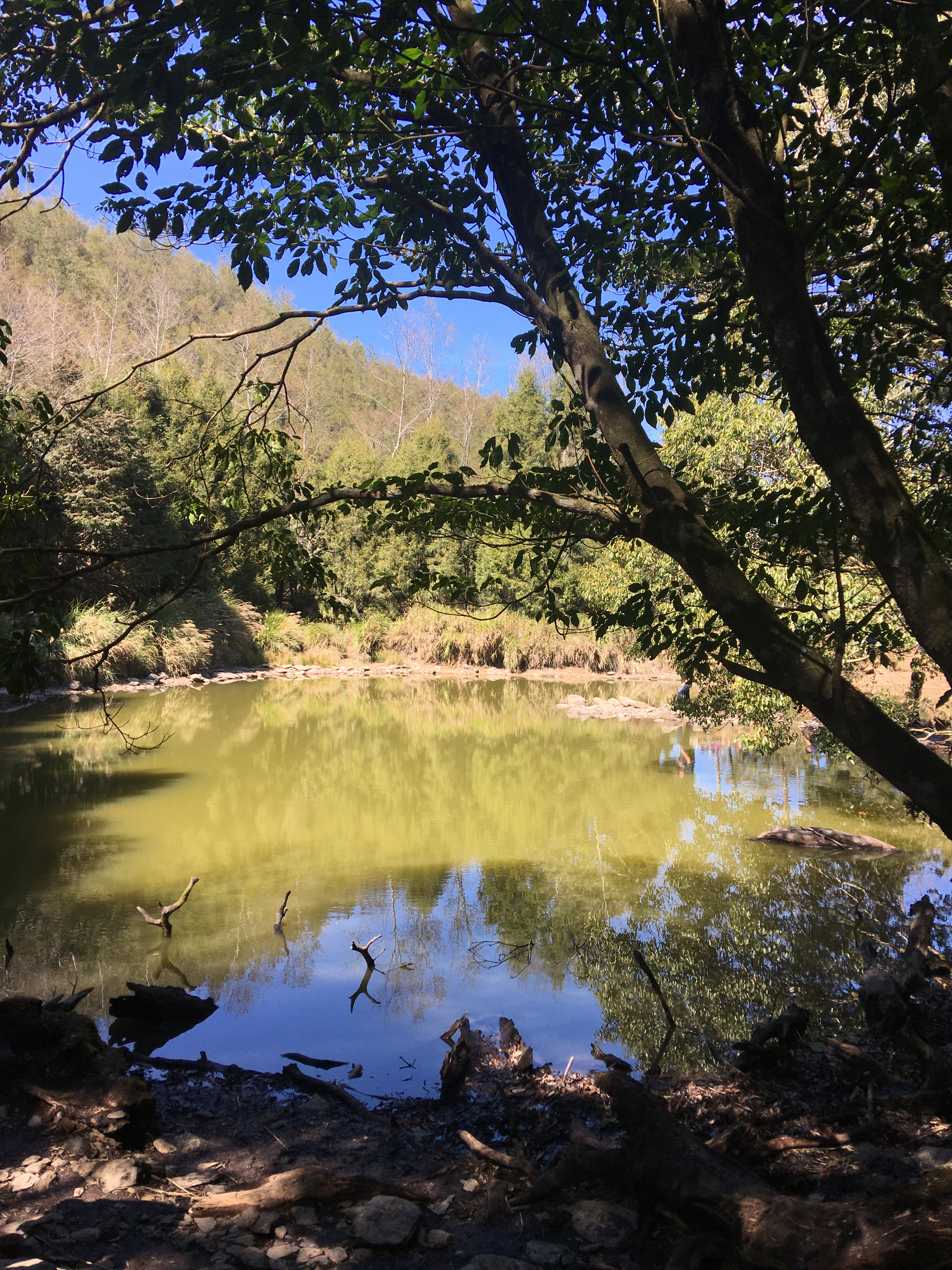 臺灣高雄市桃源區境內的天然湖泊天池